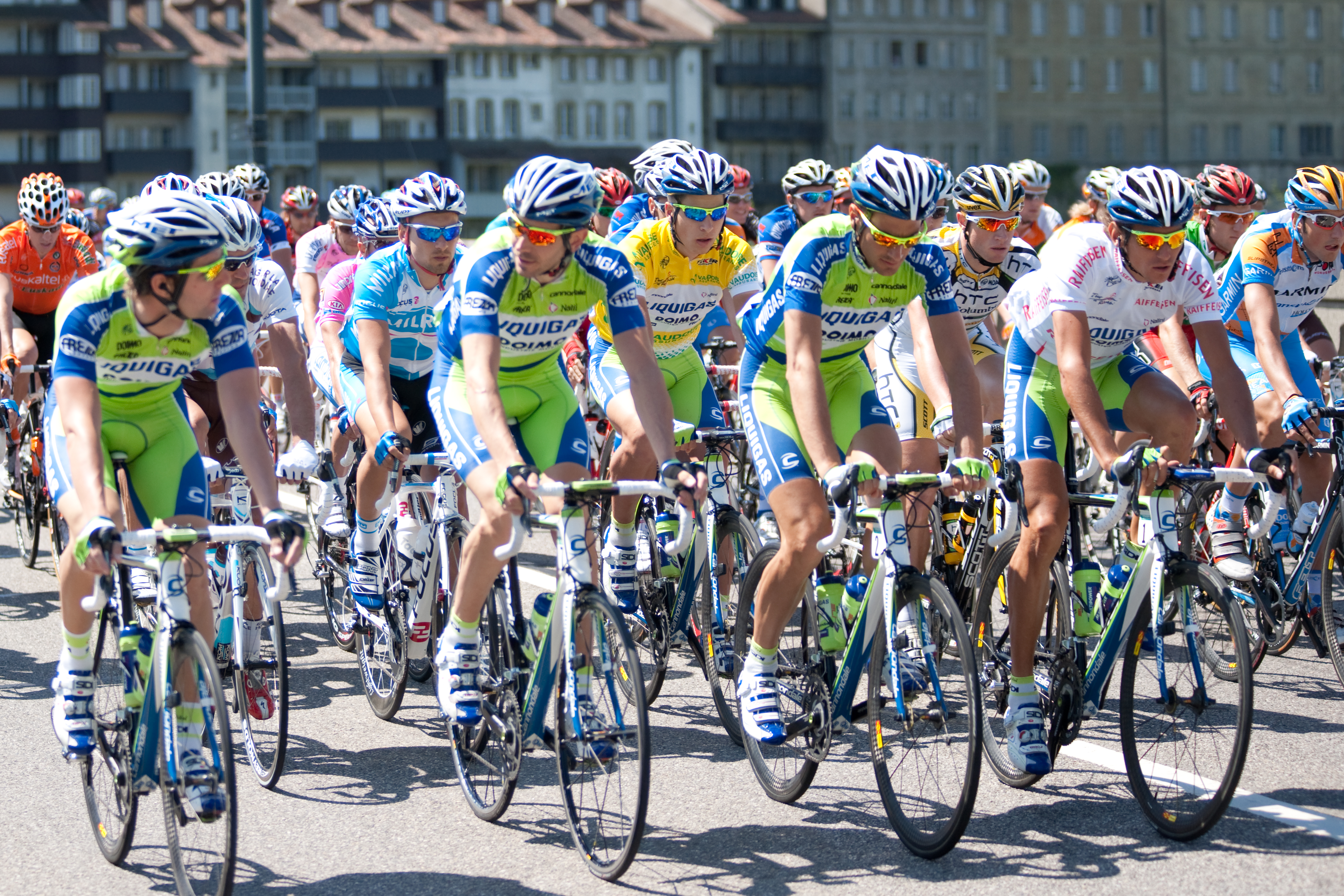 Peloton du Tour de Romandie 2010 à Fribourg sur le Pont de Zaehringen lors de la seconde étape. Le maillot jaune (Peter Sagan) et ses équipiers.